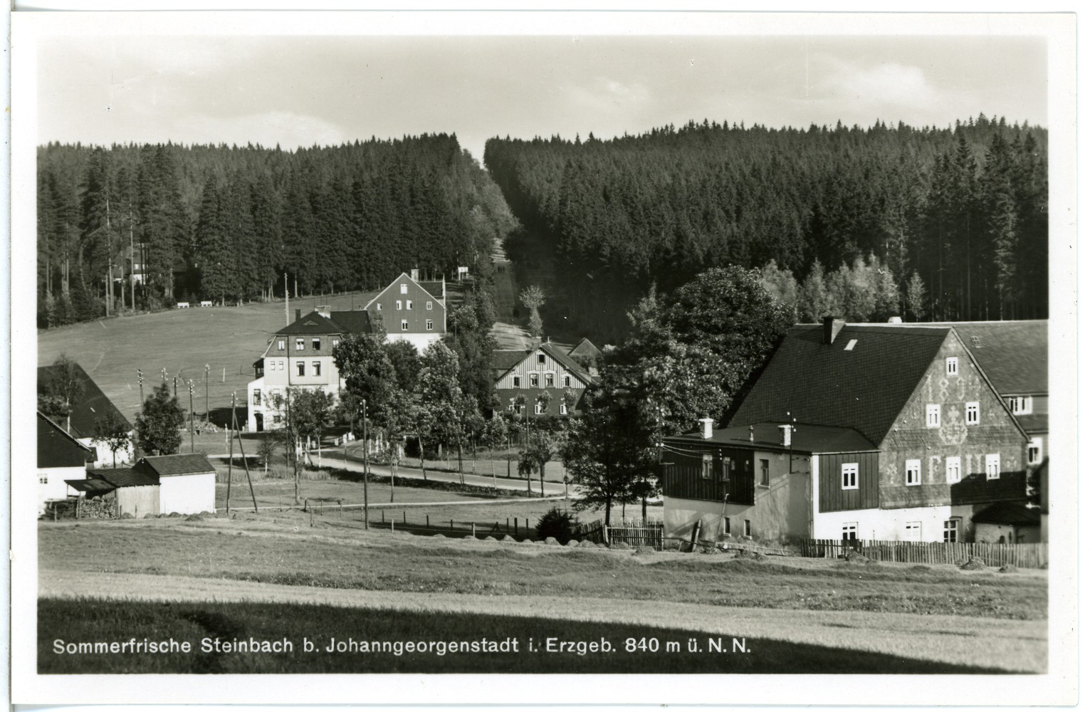 Steinbach; Blick auf Steinbach This postcard is from publisher Brück & Sohn in Meißen ( postcard has a unique number 26116 and is available in a higher resolution at the publisher. This images was uploaded in a cooperation project between Wikipedians and the publisher.